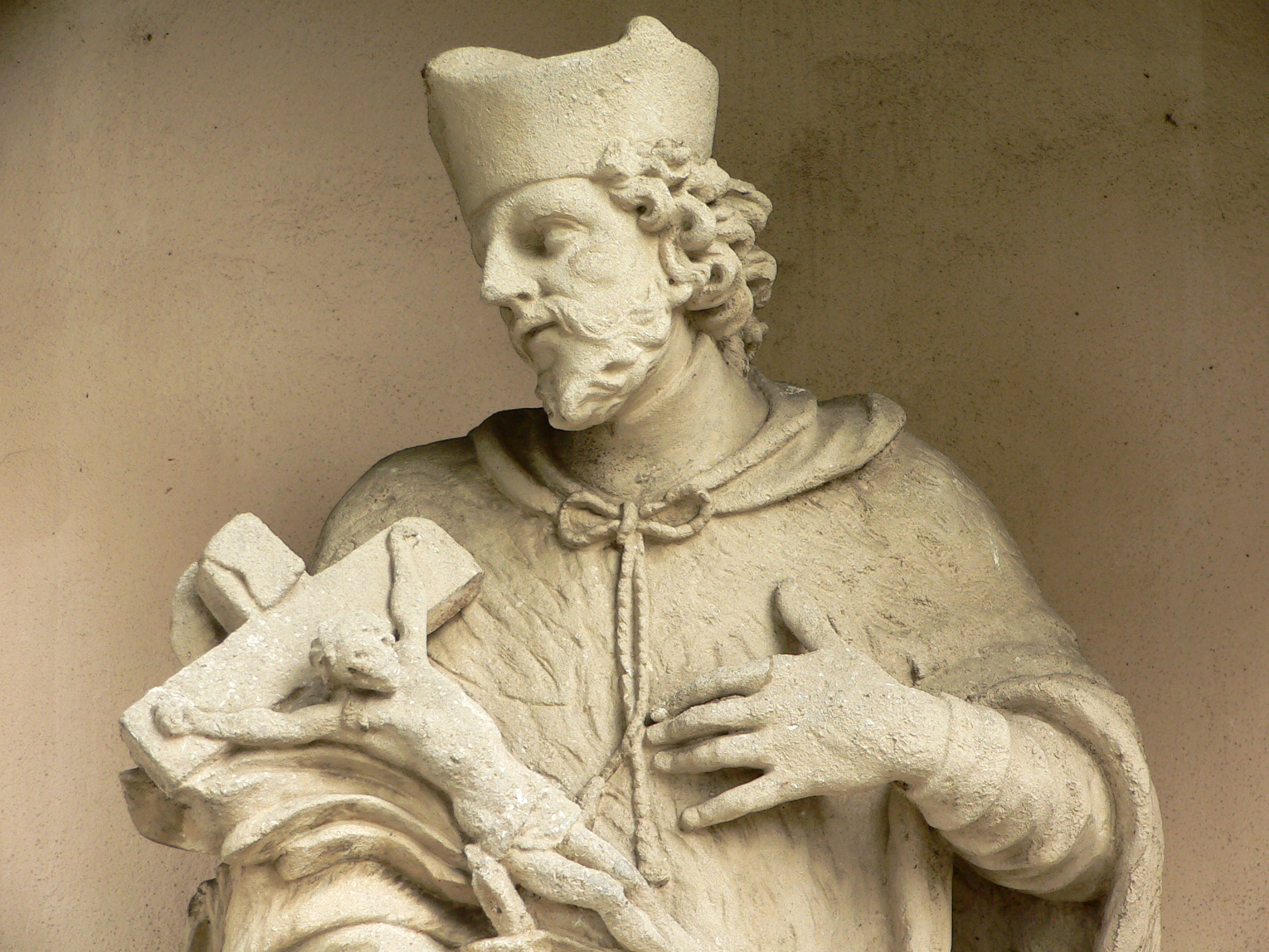 Figur, Hl. Johannes Nepomuk (Detail), an der Pfarrkirche Kaiser-Ebersdorf in Wien Simmering, Münnichplatz